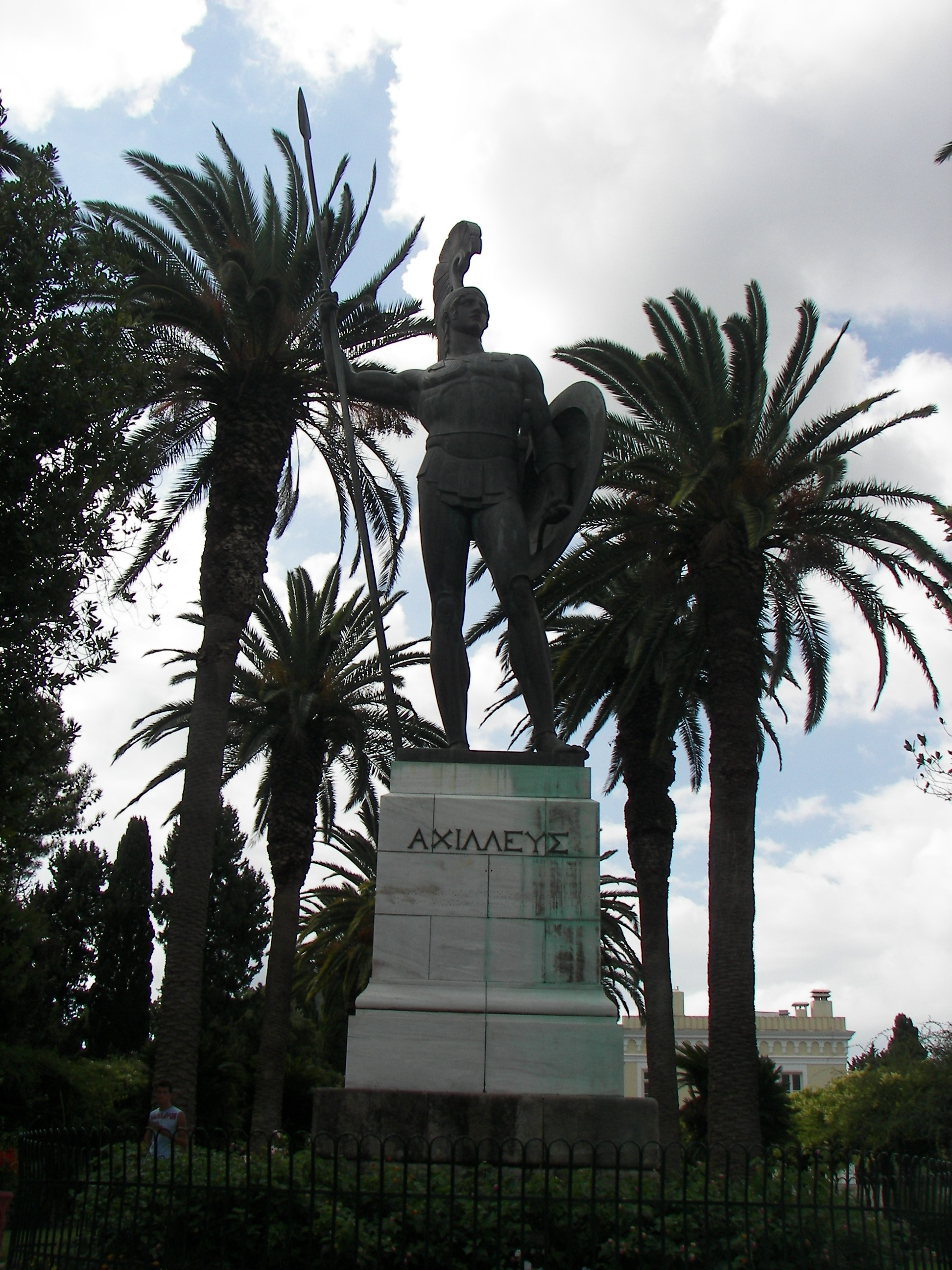 Statua in bronzo di Achille, opera dello scultore Johannes Götz, presso il palazzo dell'Achilleion a Corfù, Grecia. Fu commissionata dall'ex proprietario, il kaiser tedesco Guglielmo II di Germania.